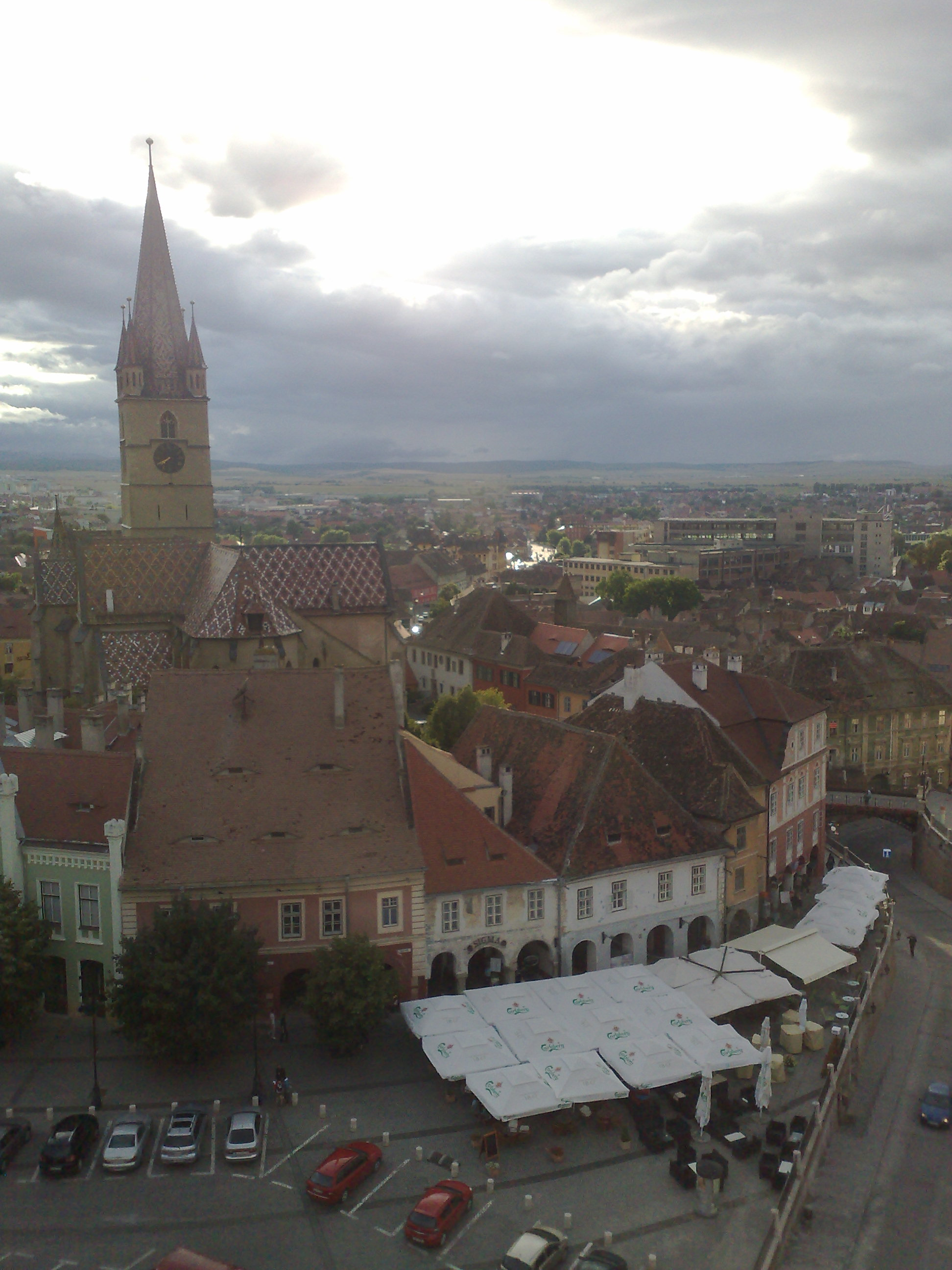 Centrul istoric Sibiu - Piata mica